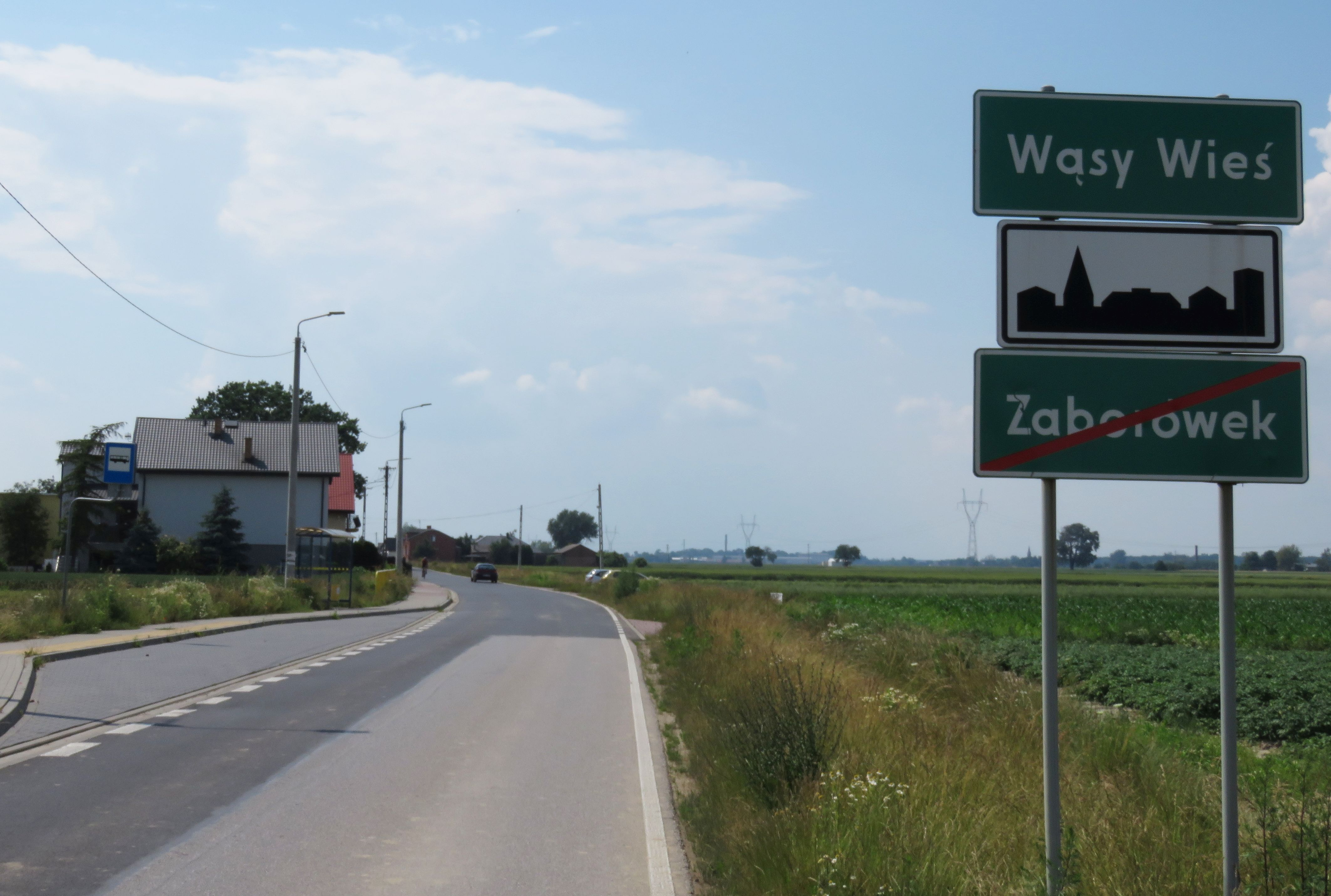 Wąsy Wieś.